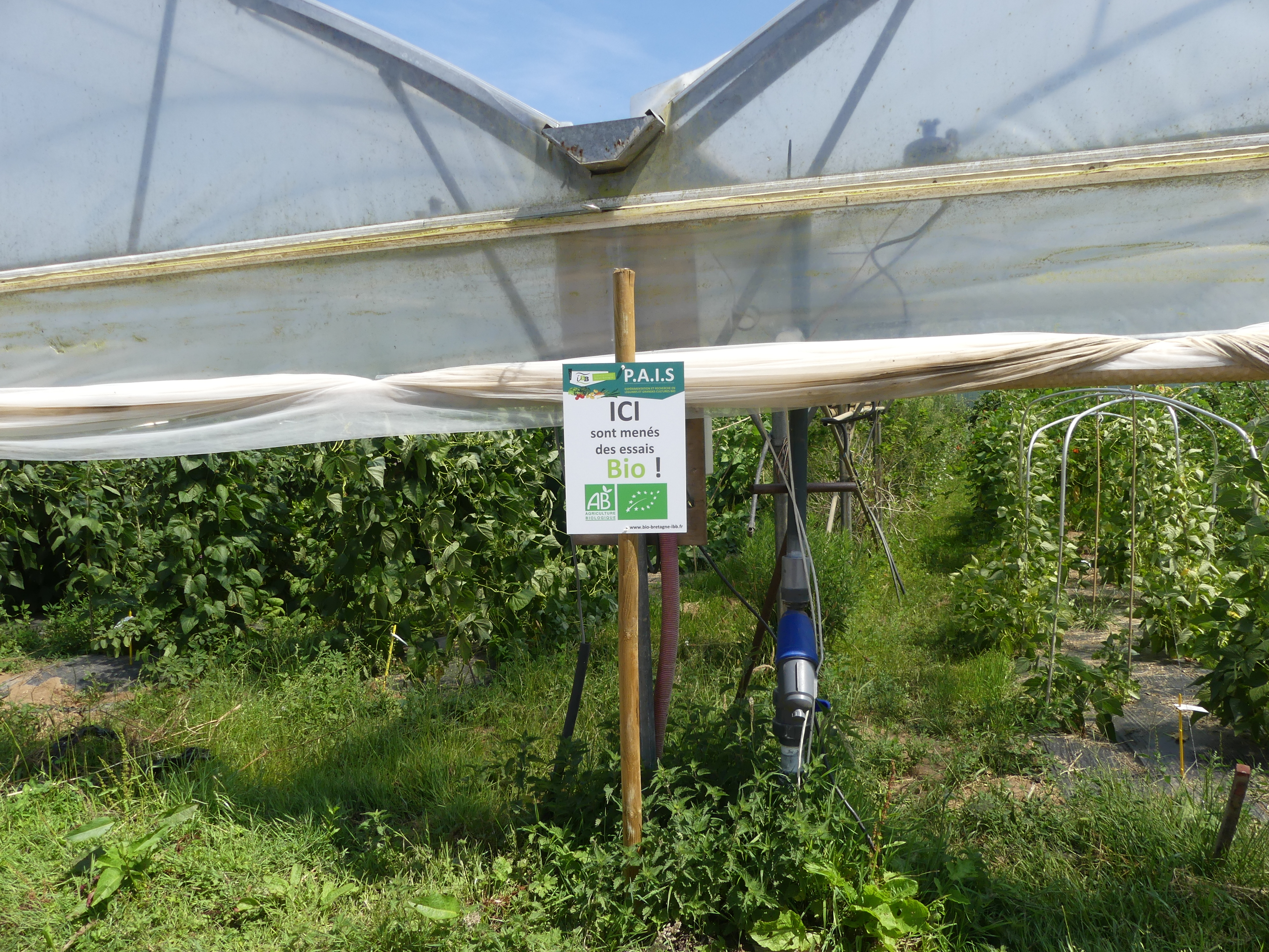 Serre d'essai de la PAIS à l'exploitation agricole de Suscinio.